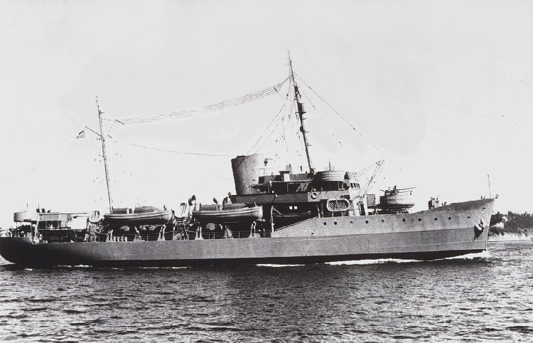 USS Pathfinder (AGS-1)